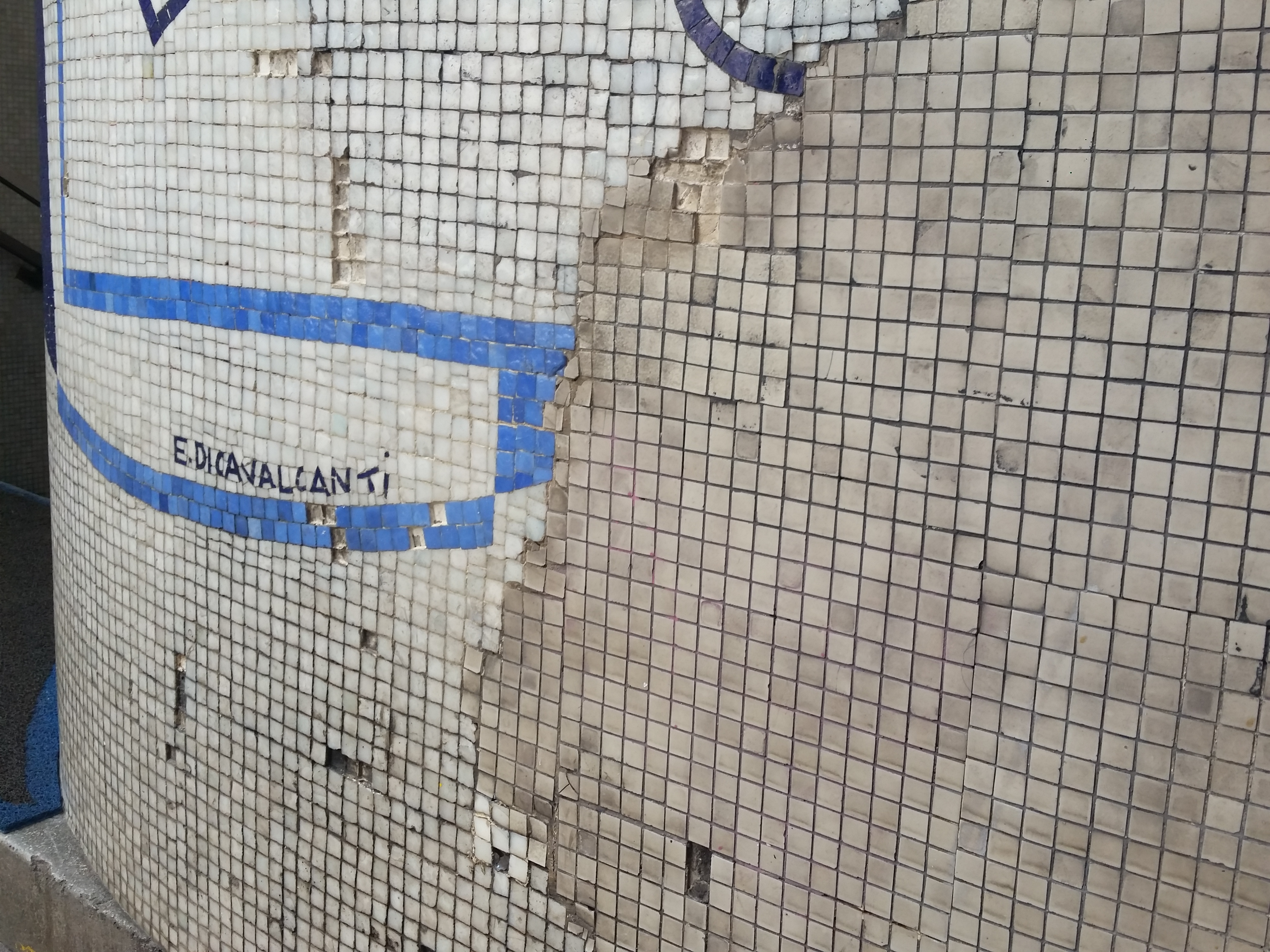 Detalhe da degradação do primeiro mural de Di Cavalcanti no Edifício Triângulo, em São Paulo, Brasil